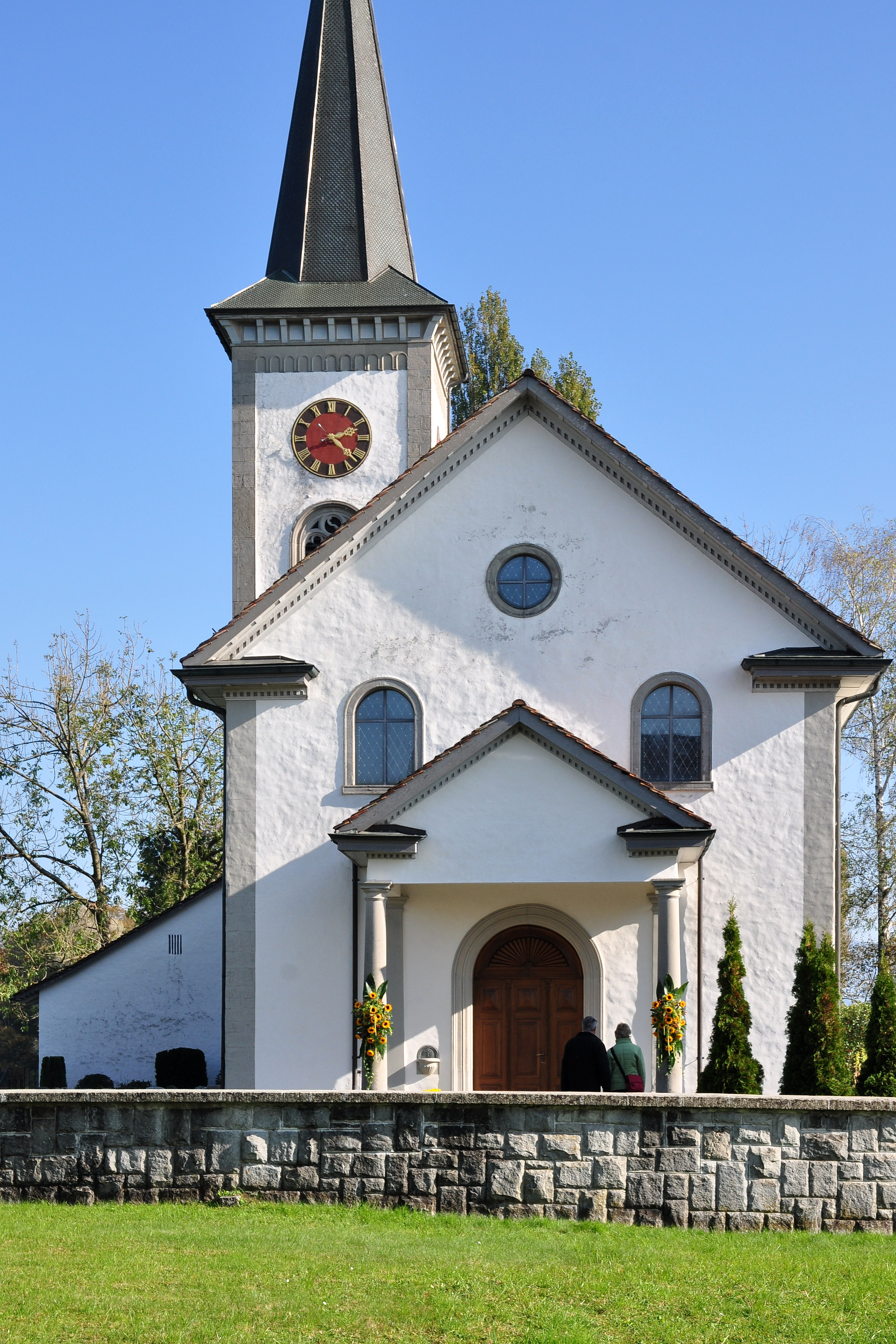 Busskirch in Jona (Switzerland) on Obersee (upper Lake Zürich) shore